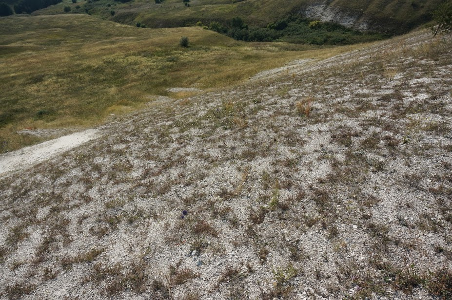 Каменистые степи на склонах холмов. Памятник природы "Подвальские террасы"